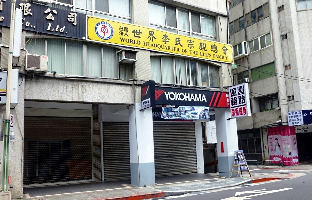 世界李氏宗親總會，位於臺北市中山區新生北路二段35號2樓。